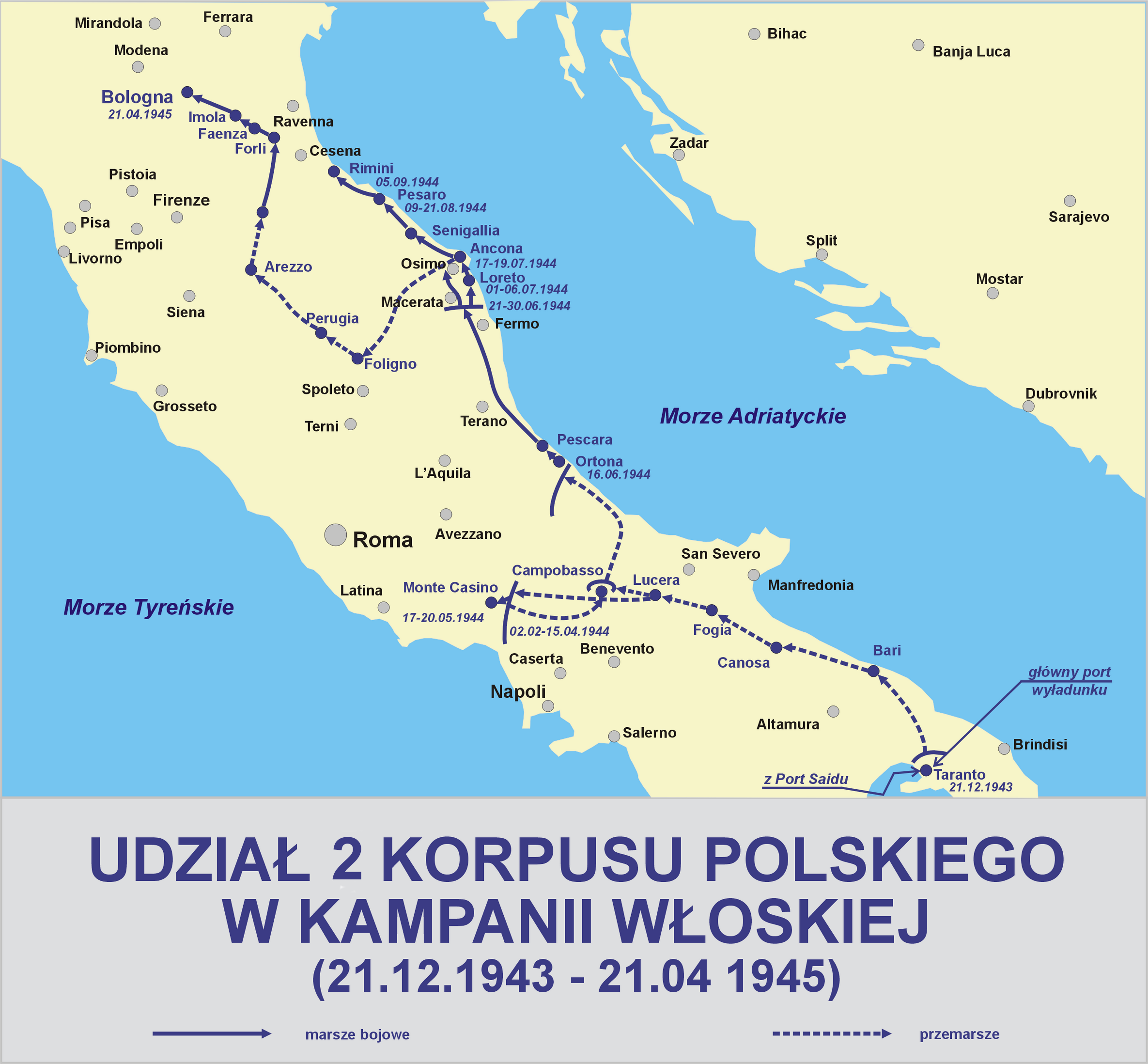 Udział II Korpusu Polskiego w kampanii włoskiej (21.12.1943 - 21.04.1945)